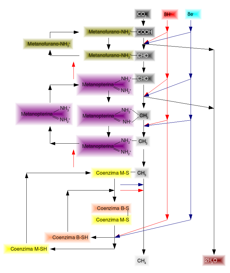 schema del processo di metanogenesi nei batteri metanogeni